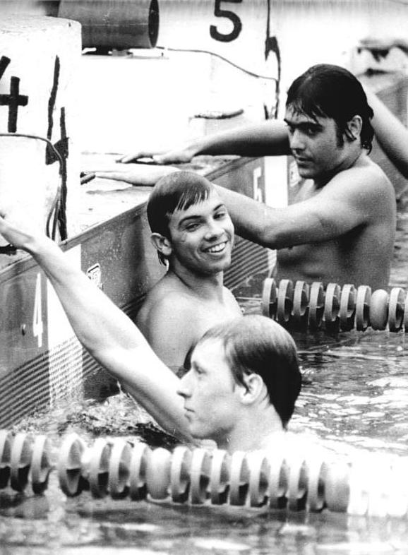 Michael Tauber, Thomas Ackenhausen, Lutz Wanja ADN-ZB Gahlbeck 7.7.77 ma-Leipzig: 28. DDR-Meisterschaften im Sportschwimmen-2.Tag-Mit 2:07,17 min war der Titelverteidiger über 200 m Rücken der Herren, Michael Tauber (SC Dynamo Berlin-M.), am 7.7.77 wiederum erfolgreich. Die Silbermedaille errang Thomas Ackenhausen (SC Magdeburg-r.) mit 2:08,84 min. Vorn Lutz Wanja vom ASK Vorwärts Potsdam. (4. Platz)